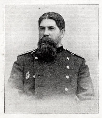 Данное изображение было использовано в статье «Бехтерев, Владимир Михайлович» опубликованной в четвёртом томе «Военной энциклопедии», который был издан книгоиздательским товариществом Ивана Дмитриевича Сытина в 1911 году в столице Российской империи городе Санкт-Петербурге.